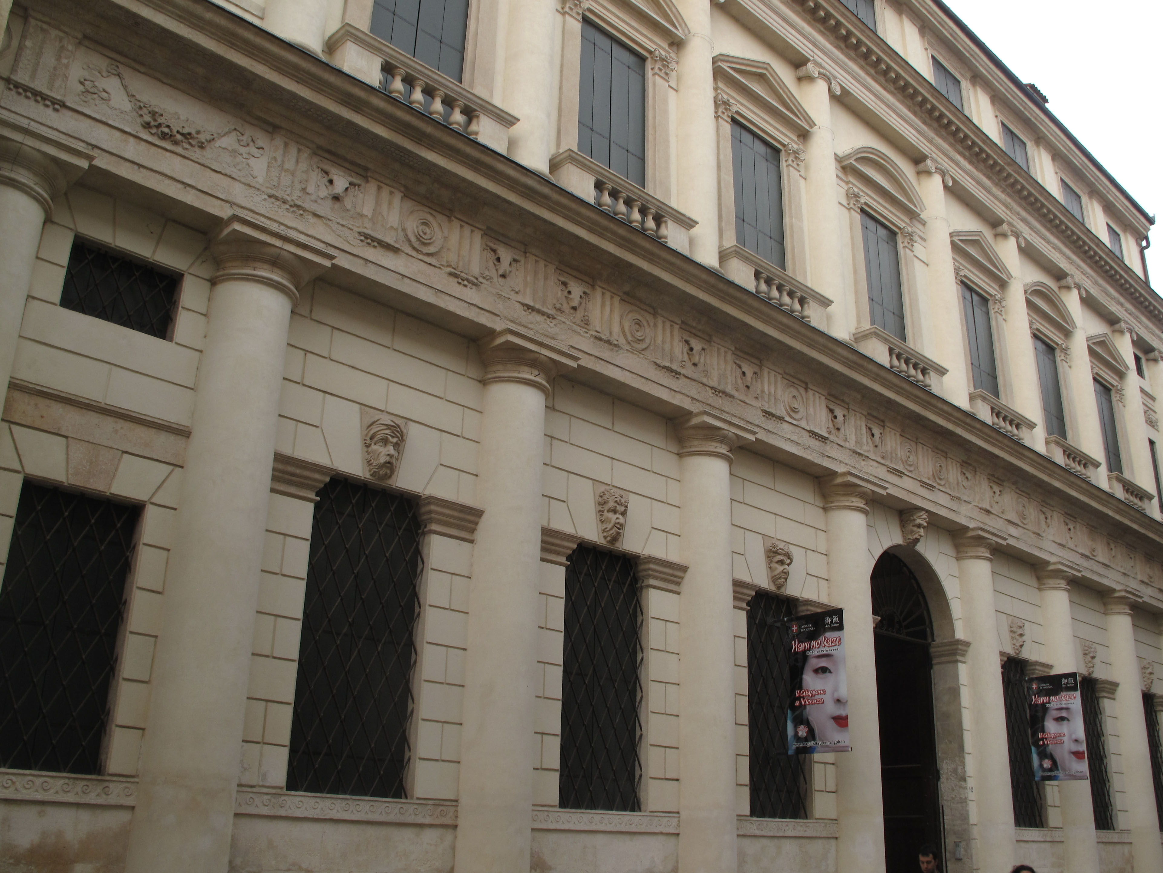 Vicenza - Palazzo Cordellina in contrà Riale